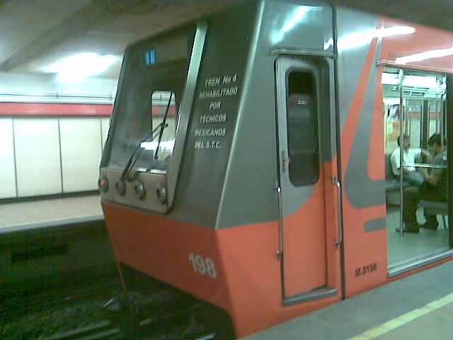 NM-73B M.143 M.198 en la estación Ferreria de la linea 6.